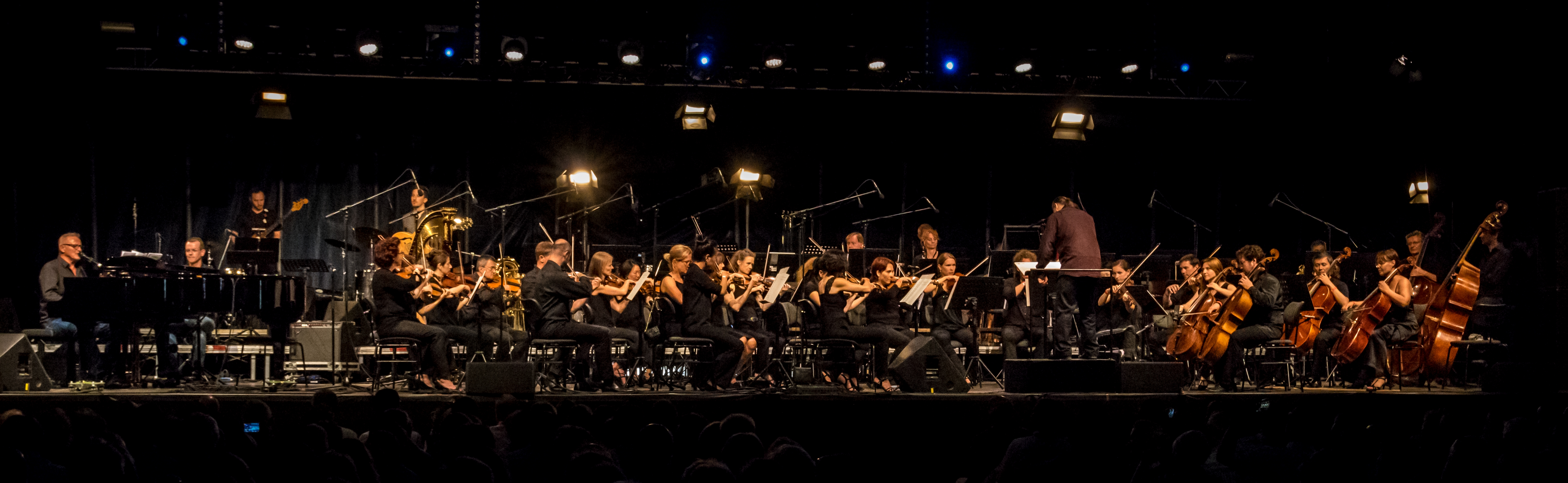 Konstantin Wecker , Philharmonisches Orchester Freiburg, Enrique Ugarte auf der Gala des ZMF 2018